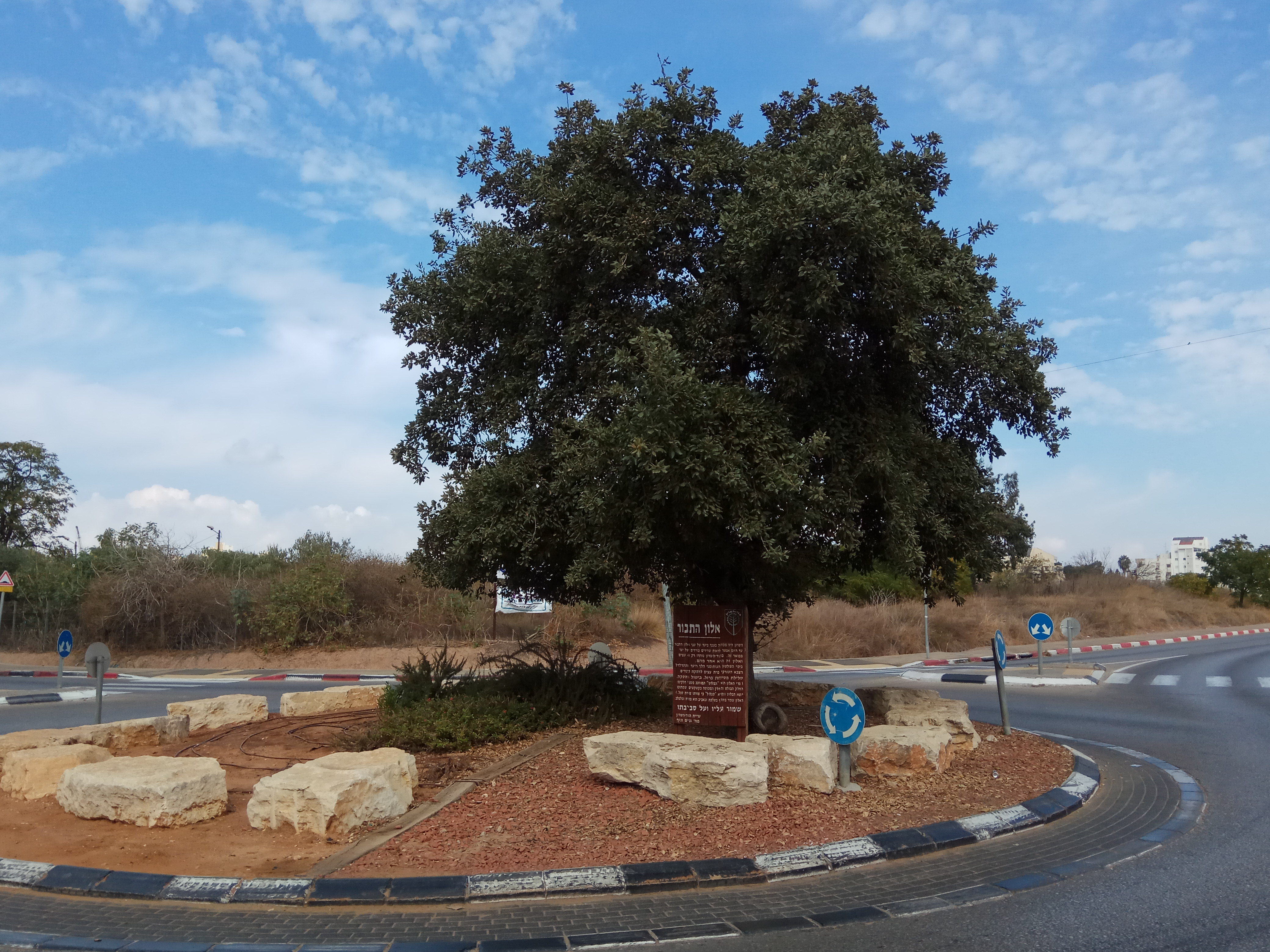 כיכר אלון התבור בהוד השרון, בצומת ויצמן-שז"ר